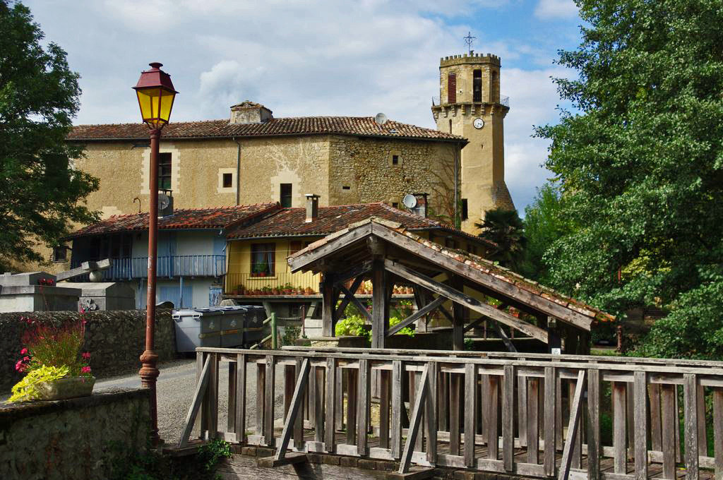 Ensemble monumental de Tourtouse. Au 17ème siècle, la demeure de l'évêque Bruno de Ruade fut reconstruite avec les pierres de l'ancien château du 12ème siècle, sa partie postérieure s'appuyant contre la terrasse portant le donjon. Deux vastes salles ont conservé leurs plafonds à la française. .